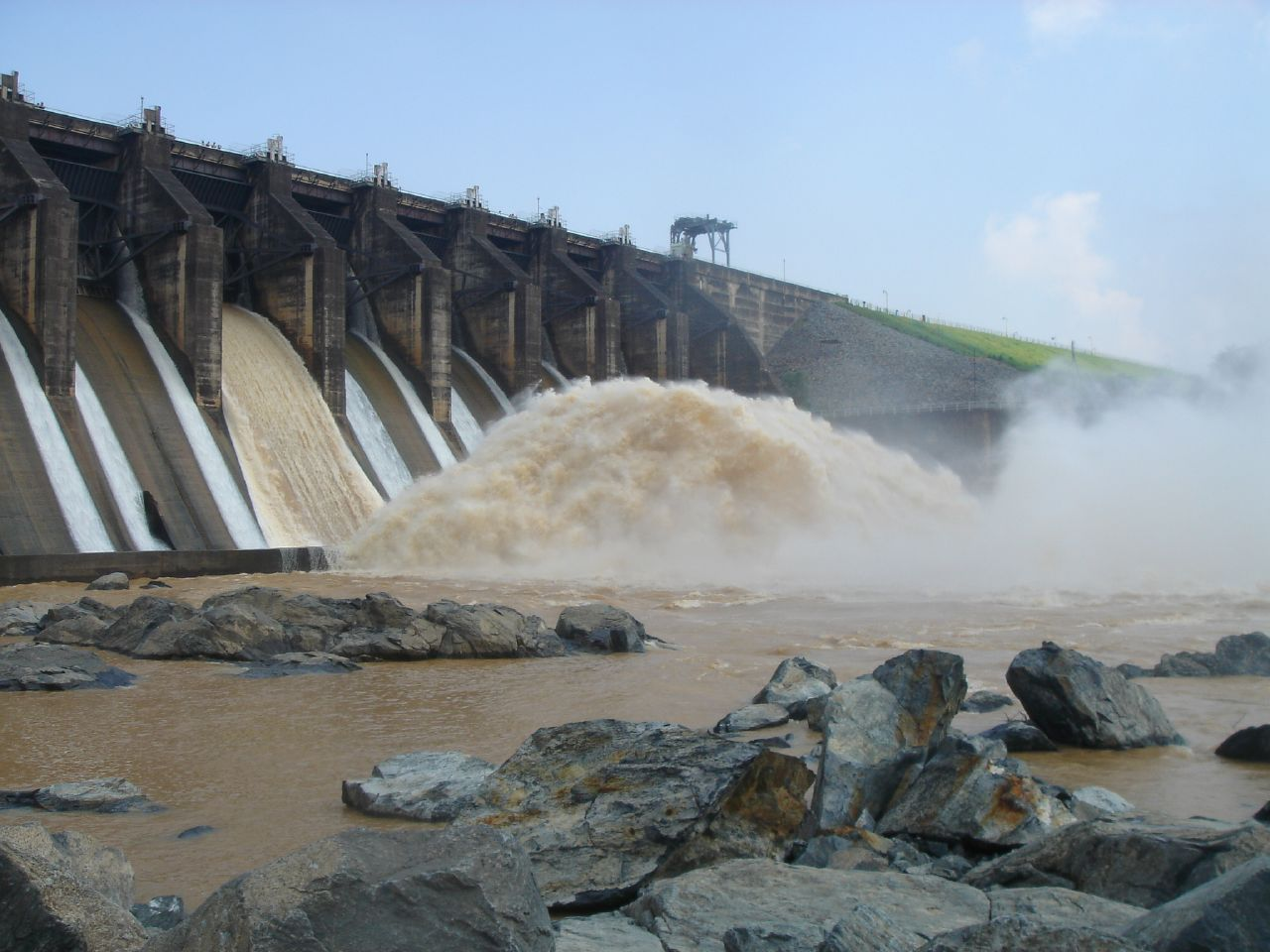 Mythodn Dam